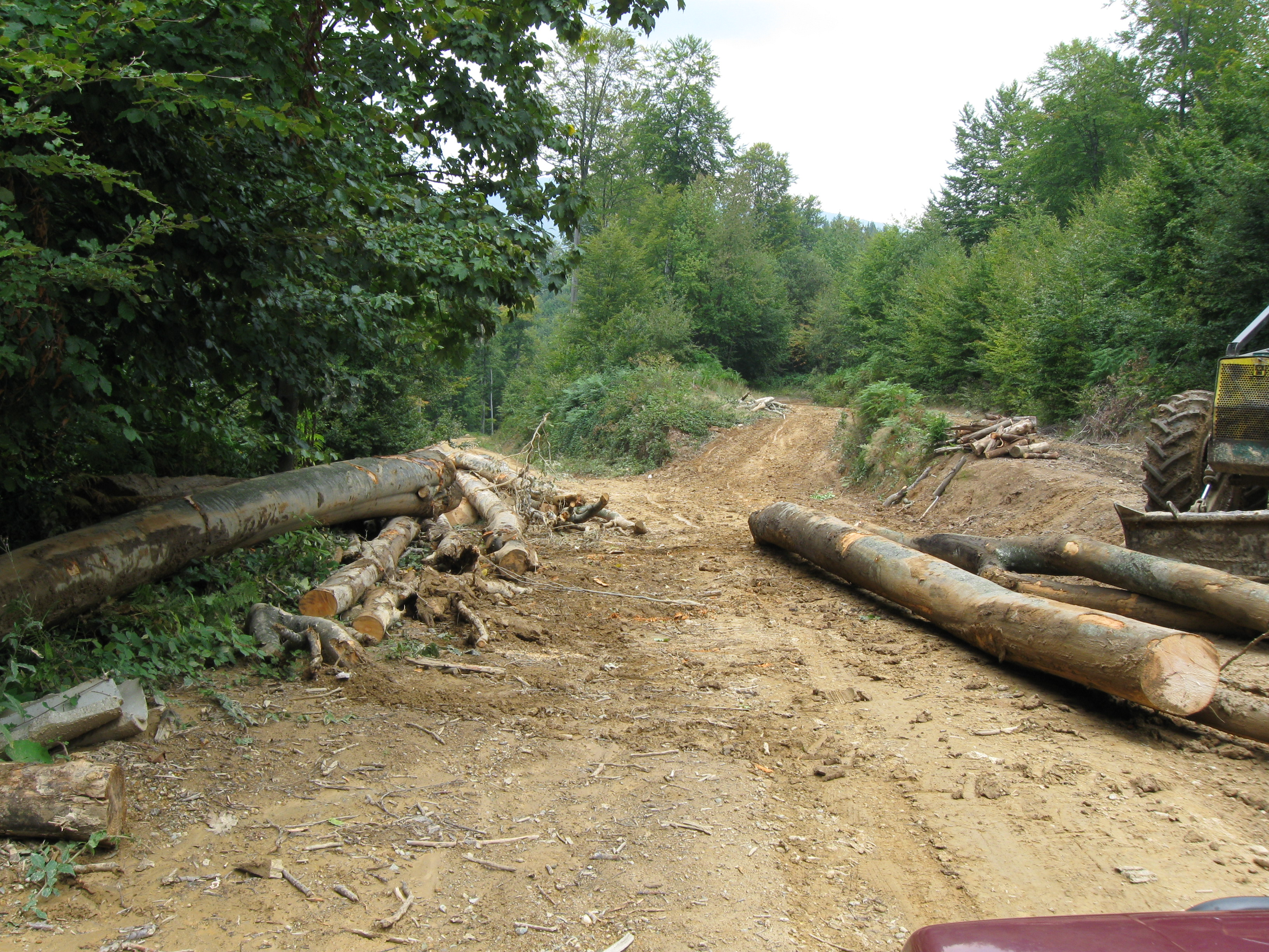 Неконтролисана сеча шуме у Качару.